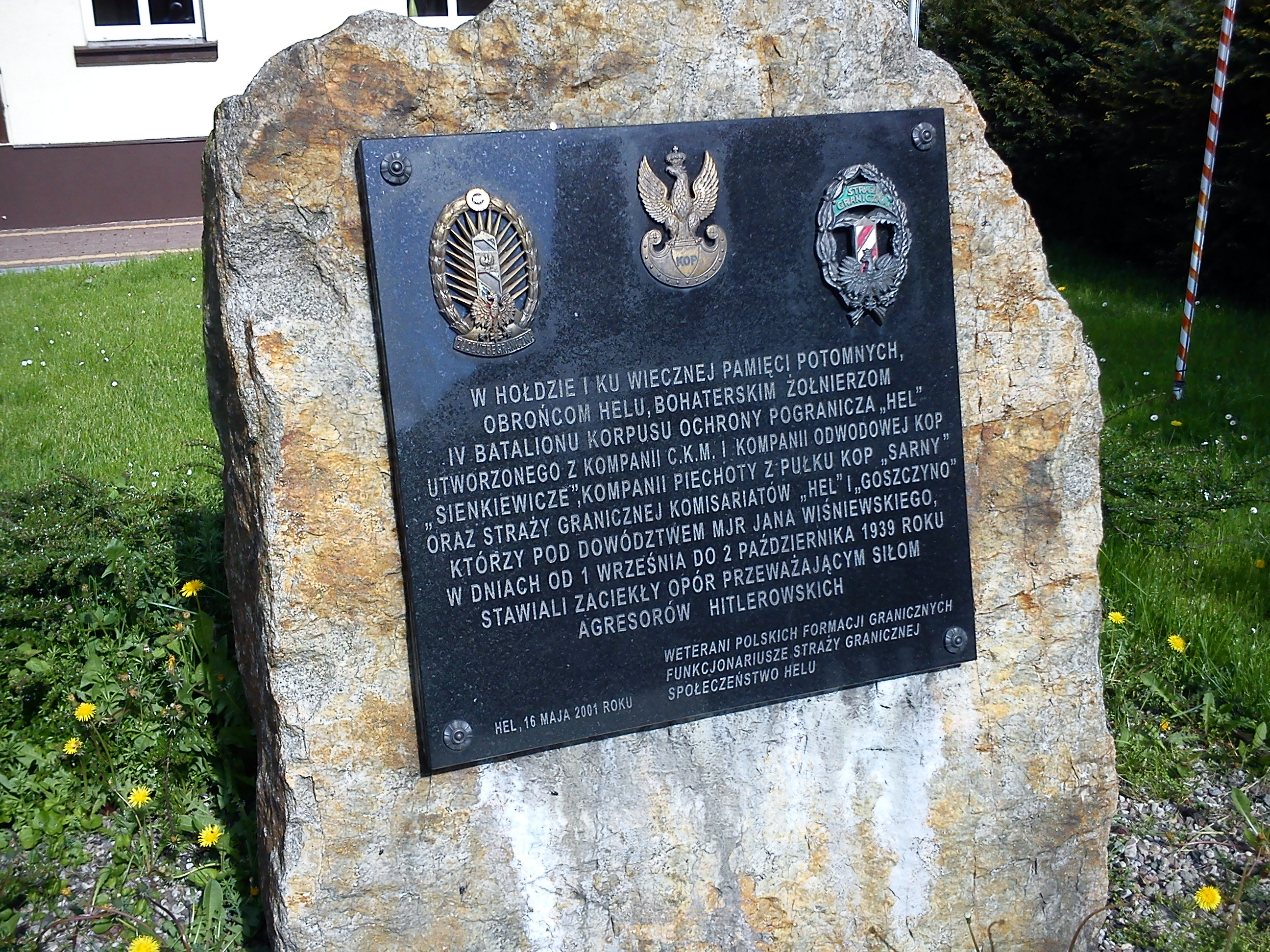 Głaz z tablicą pamiatkową Batalionu KOP "Hel" w Helu na ul. Wiejskiej